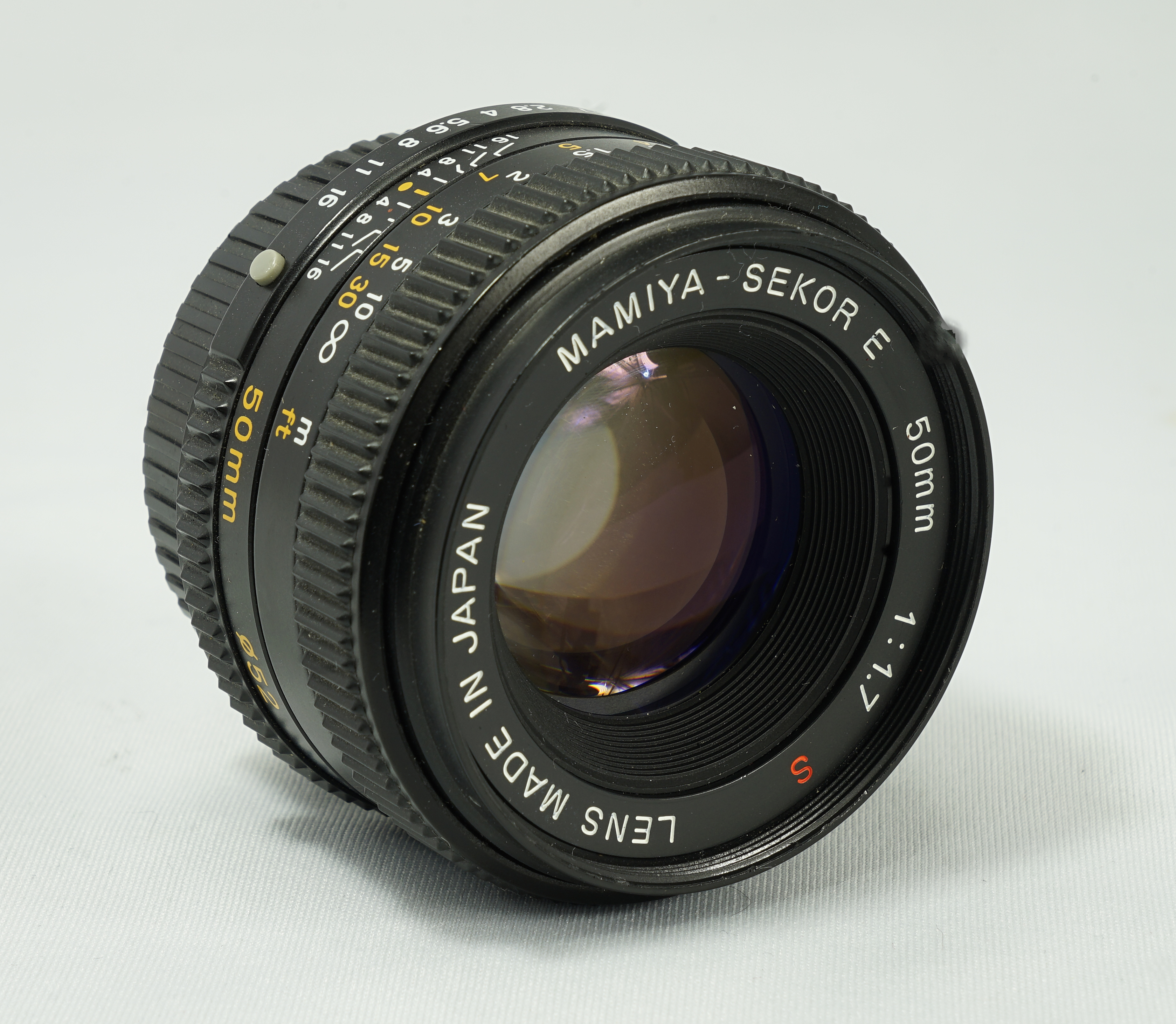 Mamiya-Sekor E f1.7 50 mm